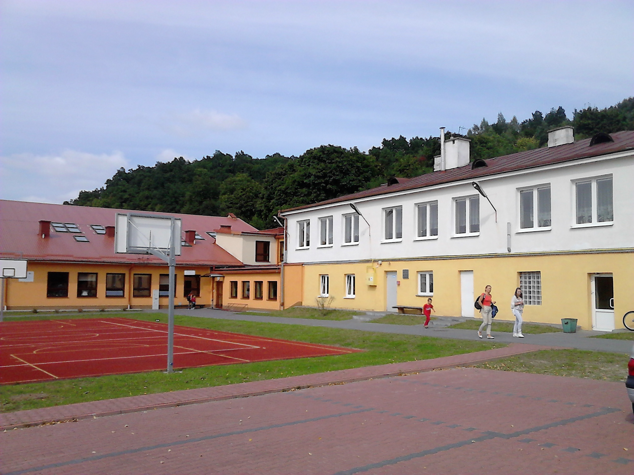 Szkoła Podstawowa i hala sportowo-widowiskowa w Bochotnicy